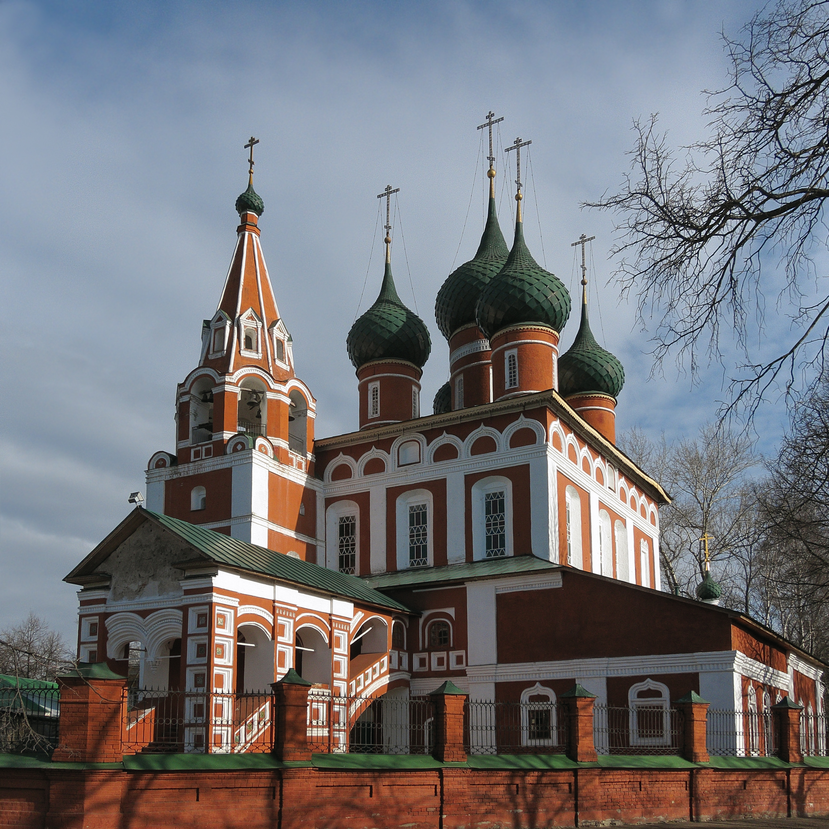 Комплекс церкви Михаила Архангела: улица Первомайская, 67, Ярославль, Ярославская область